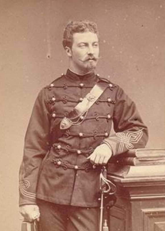 Fernando de Orléans, duque d'Alençon, irmão do conde d'Eu. Ferdinand d’Orléans, duc d’Alençon Ferdinand Philippe Marie, duc d'Alençon Ferdinand d'Orléans (1844-1910) Fernando de Orléans, duque d'Alençon